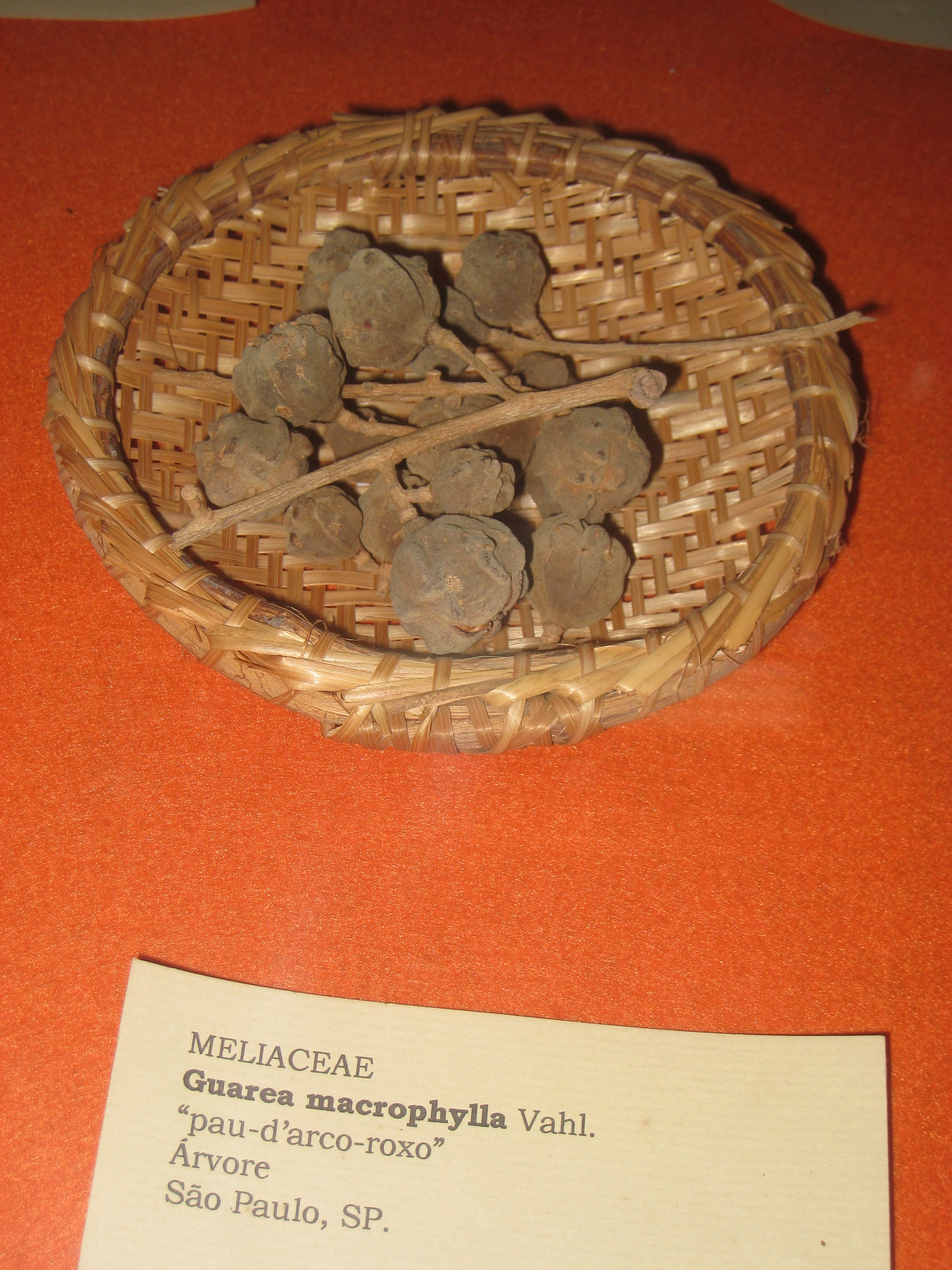 Guarea macrophylla specimen in the Museu Botânico Dr. João Barbosa Rodrigues, Jardim Botânico de São Paulo, São Paulo City, SP, Brazil.